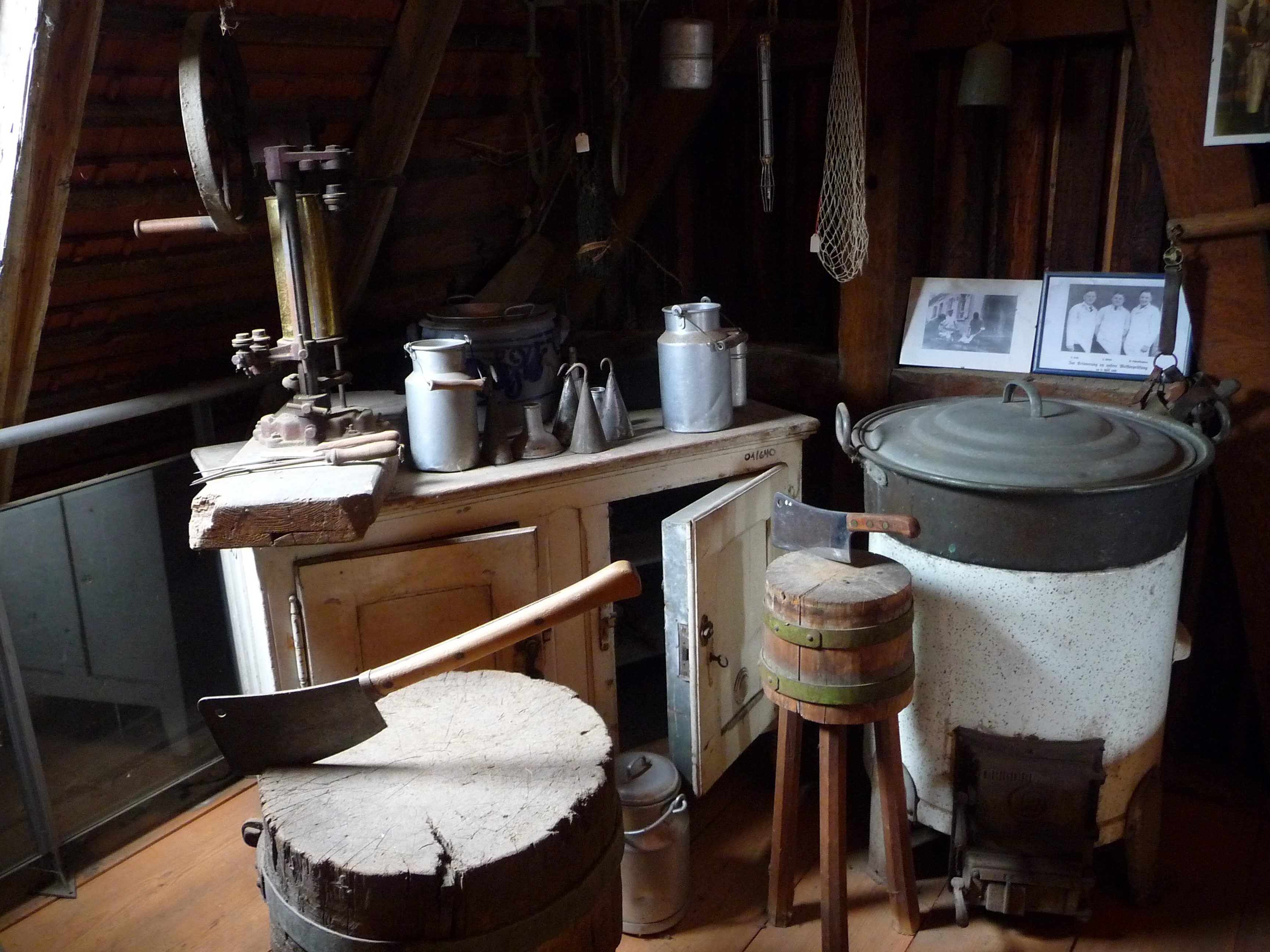 Utensilien, die Anfang des 19. Jahrhunderts bei einer Hausschlachtung verwendet wurden, fotografiert im Heimatmuseum im Heidelberger Stadtteil Kirchheim (Baden-Württemberg, Deutschland)